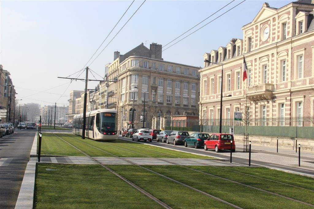 Rame au centre ville